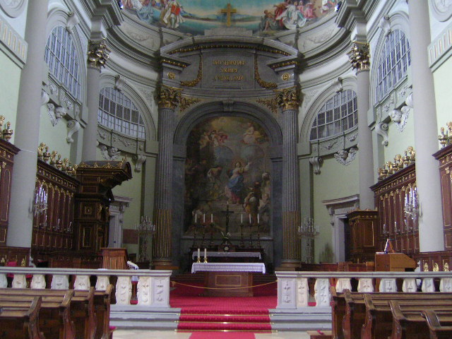 Váci székesegyház főoltára (Konstantin tér)